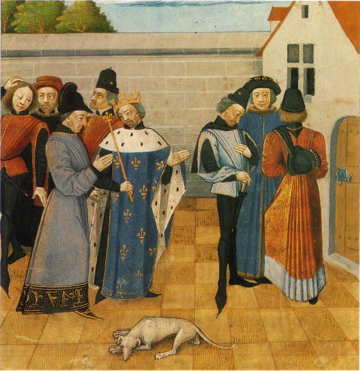 Chilpéric Ier s'acquiert la grâce des puissants. Manuscrit du XVème siècle. Grandes chroniques. Bibliothèque nationale, Paris.